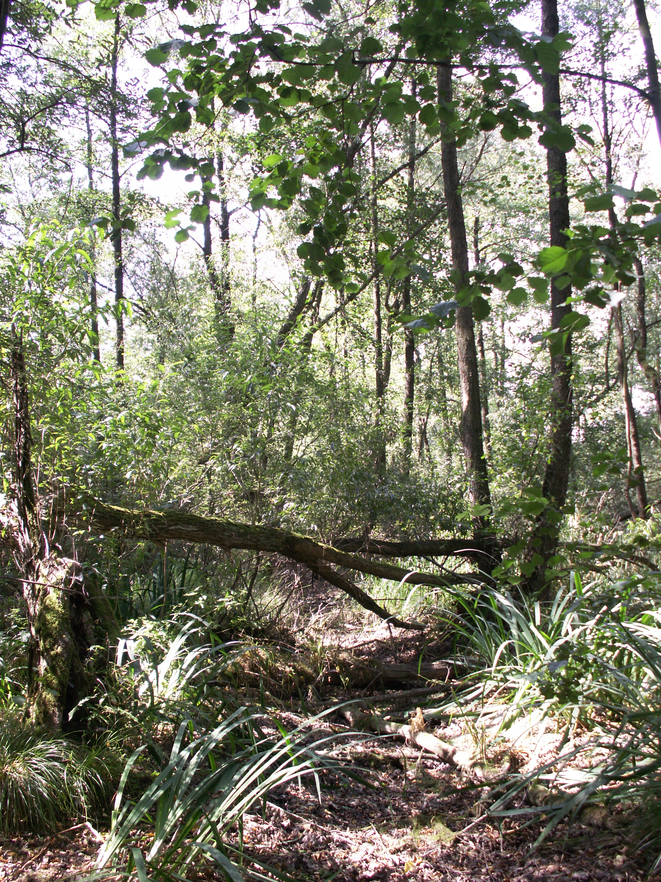 PR Džungle, ev. č. 2206, okres Bruntál, Moravskoslezský kraj